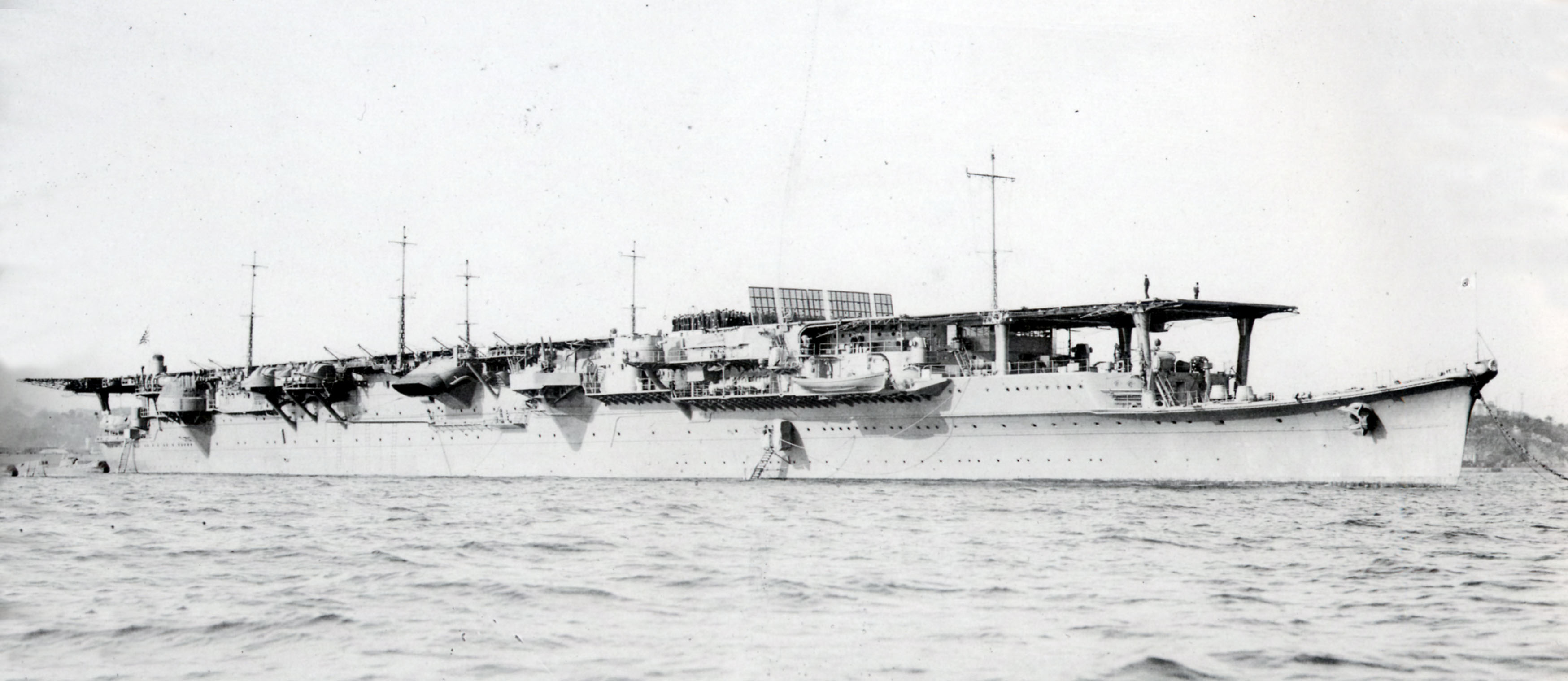 日本海軍航空母艦祥鳳型「祥鳳」横須賀軍港内にて撮影されたもの。